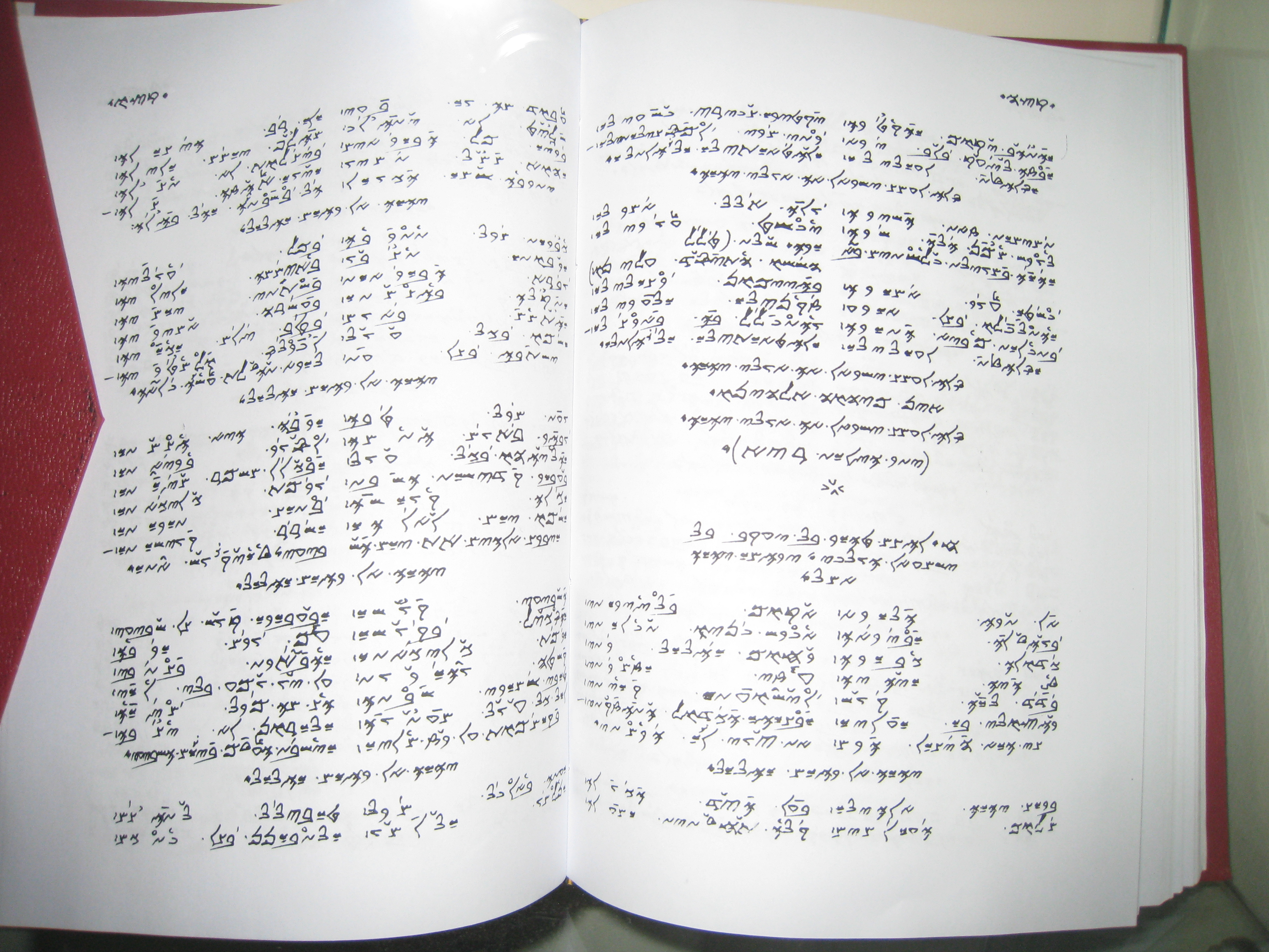 ספר תפילה שומרוני